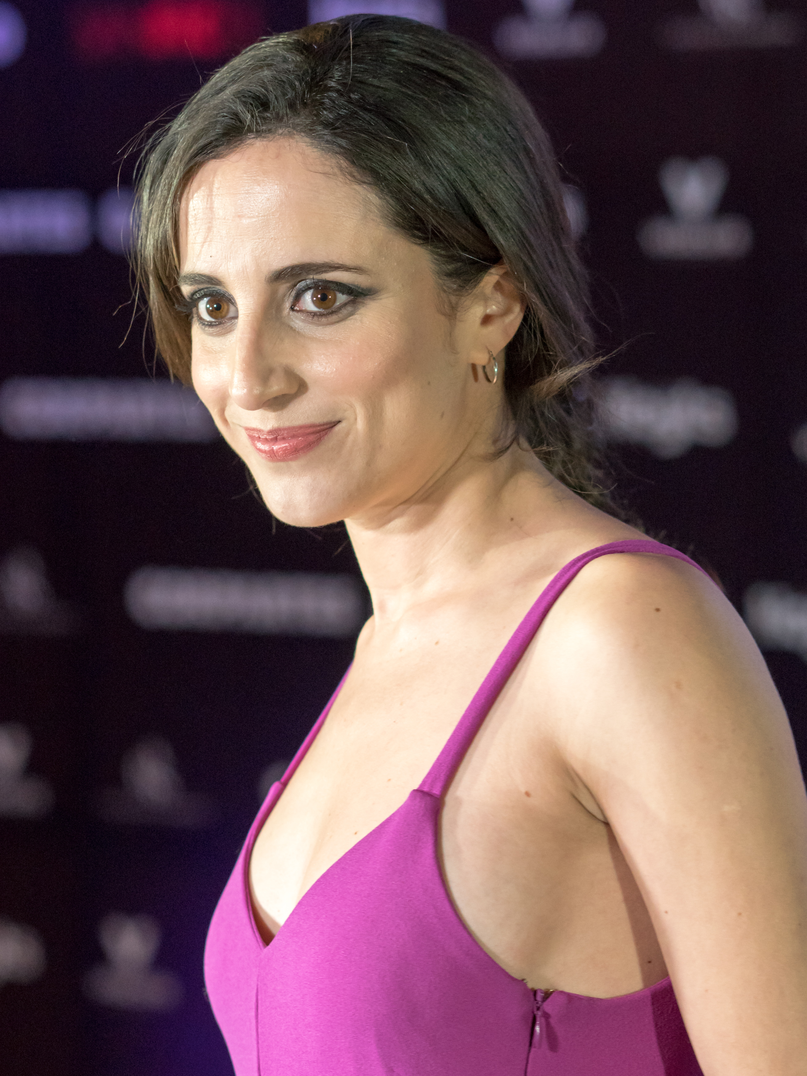 Camila Hirane en la Ceremonia de Clausura de Sanfic 13 - 2017